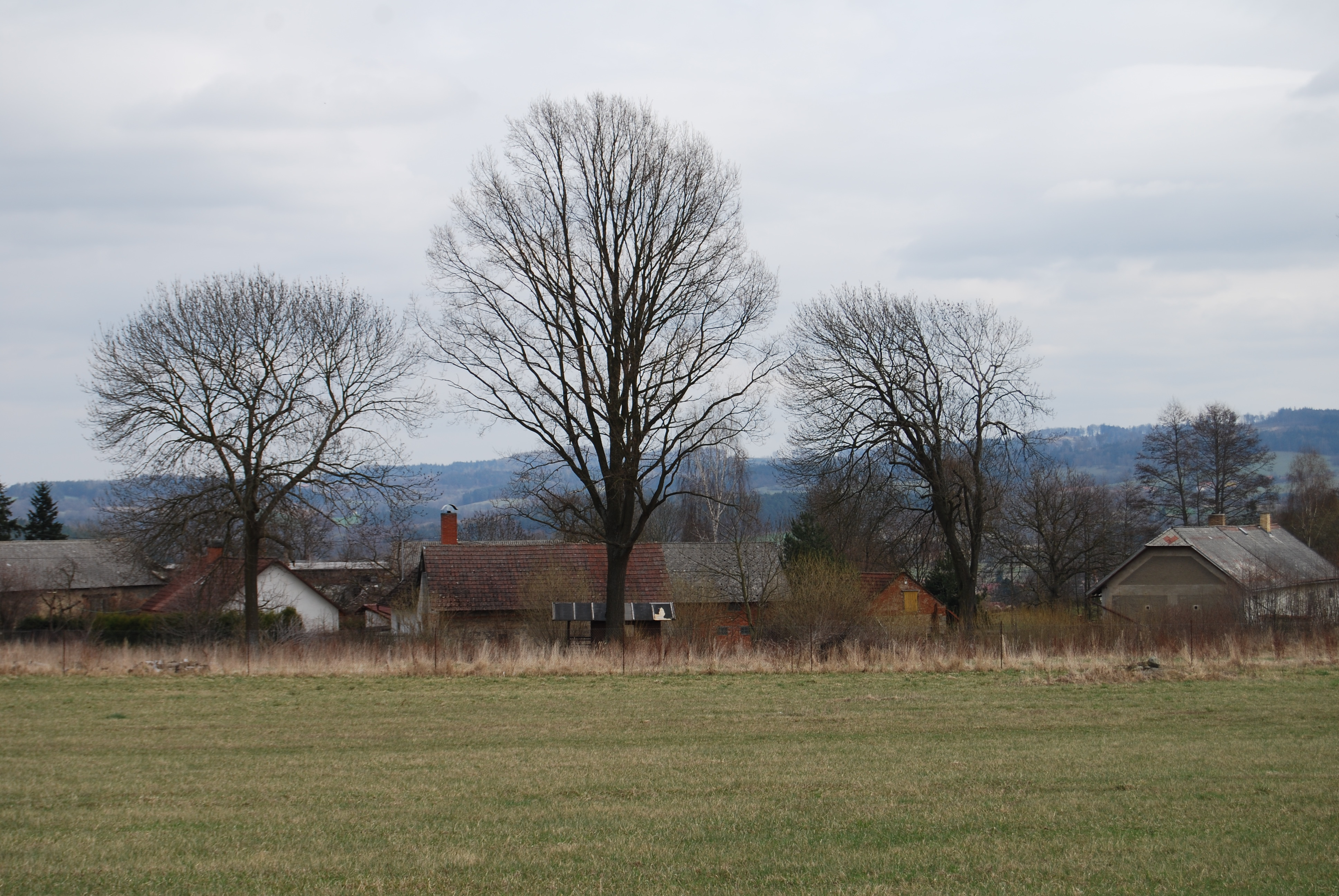 Pohled na obec. Krchov je malá vesnice, část obce Petrovice v okrese Příbram. Česká republika.